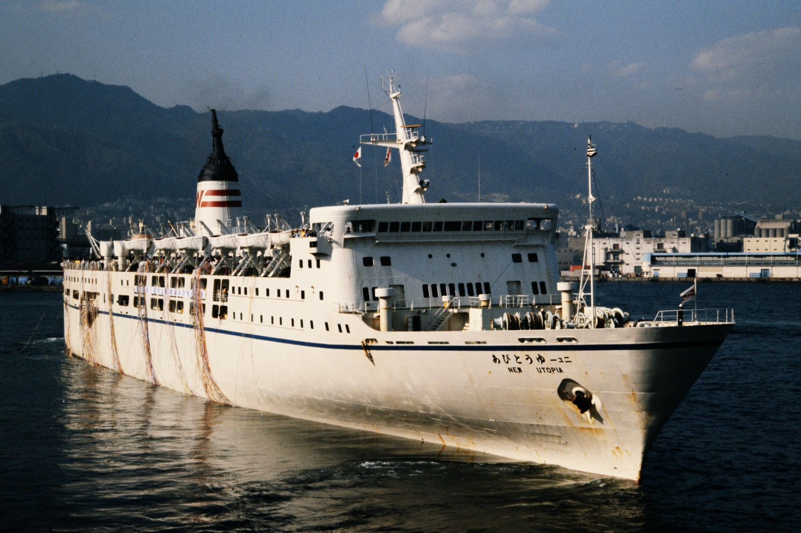 松下青年の船として神戸港を出港する西日本汽船・ニューゆうとぴあ